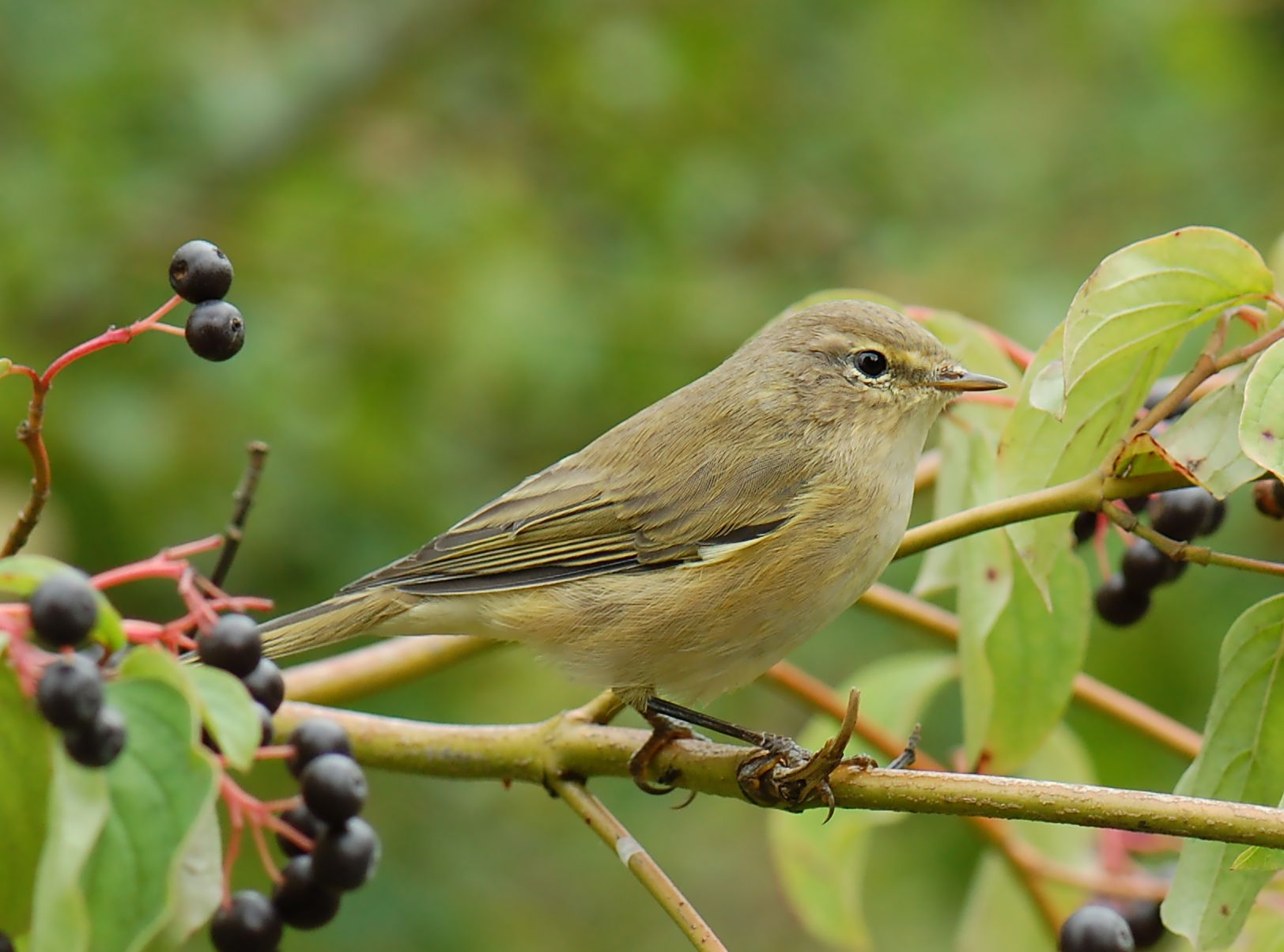 Zilpzalp (Phylloscopus collybita), Berlin-Zehlendorf